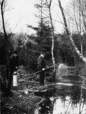 Saprolausbringung in Hamburg